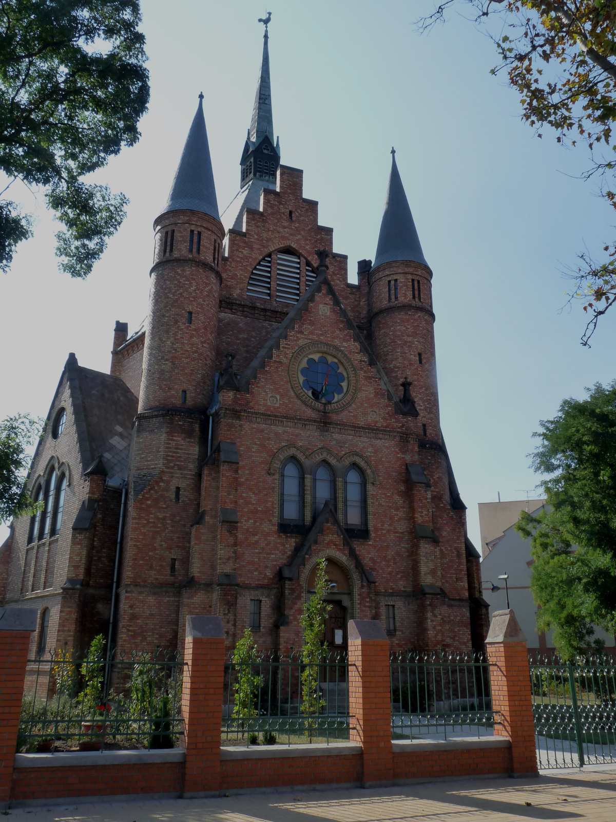 református templom (Szolnok, Sóház utca 2.) This is a photo of a monument in Hungary. Identifier: 17739